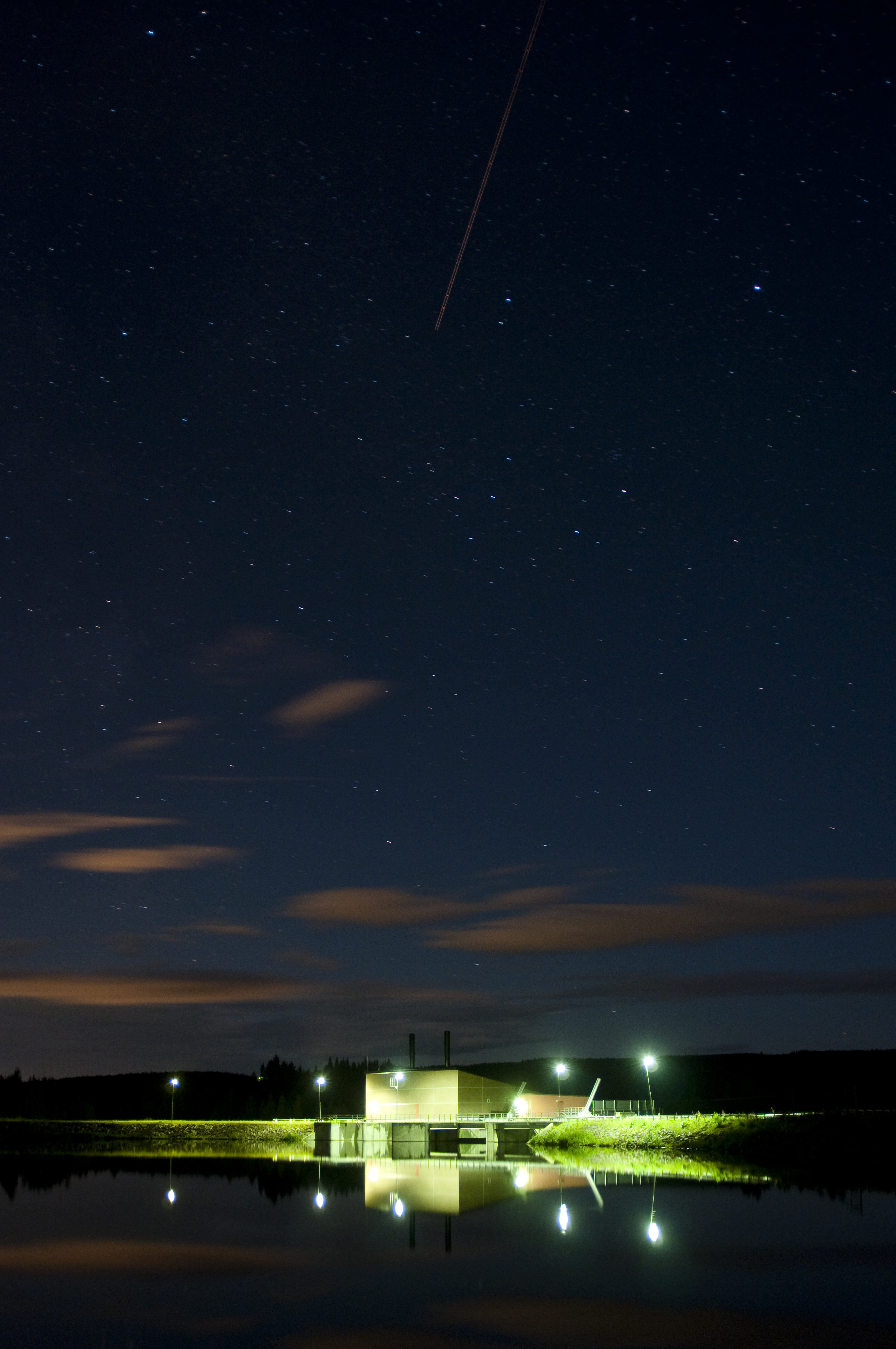 Kraftverket vid Högfors i Hårkans älv på natten.